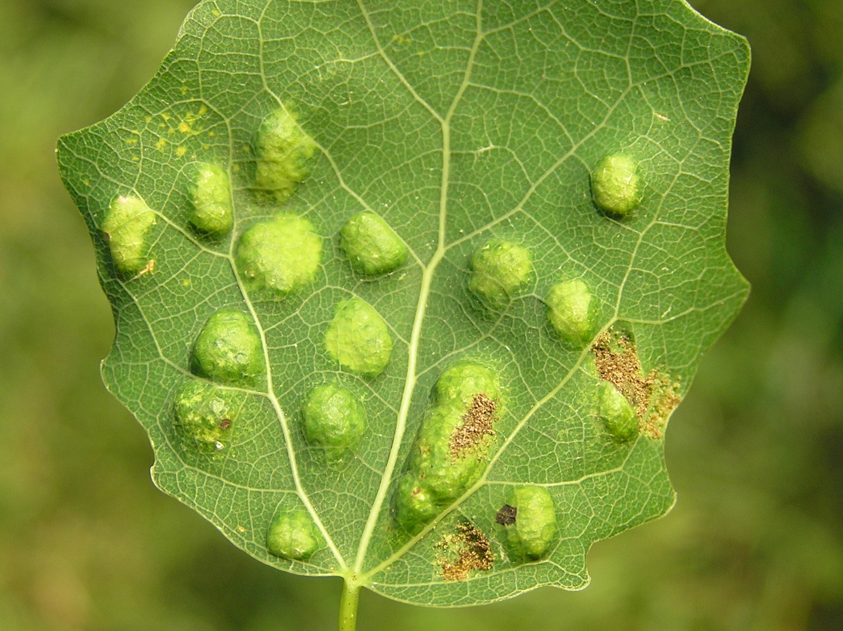 Phyllocoptes populi Nal.; (Szpeciel) Białowieża, Polska